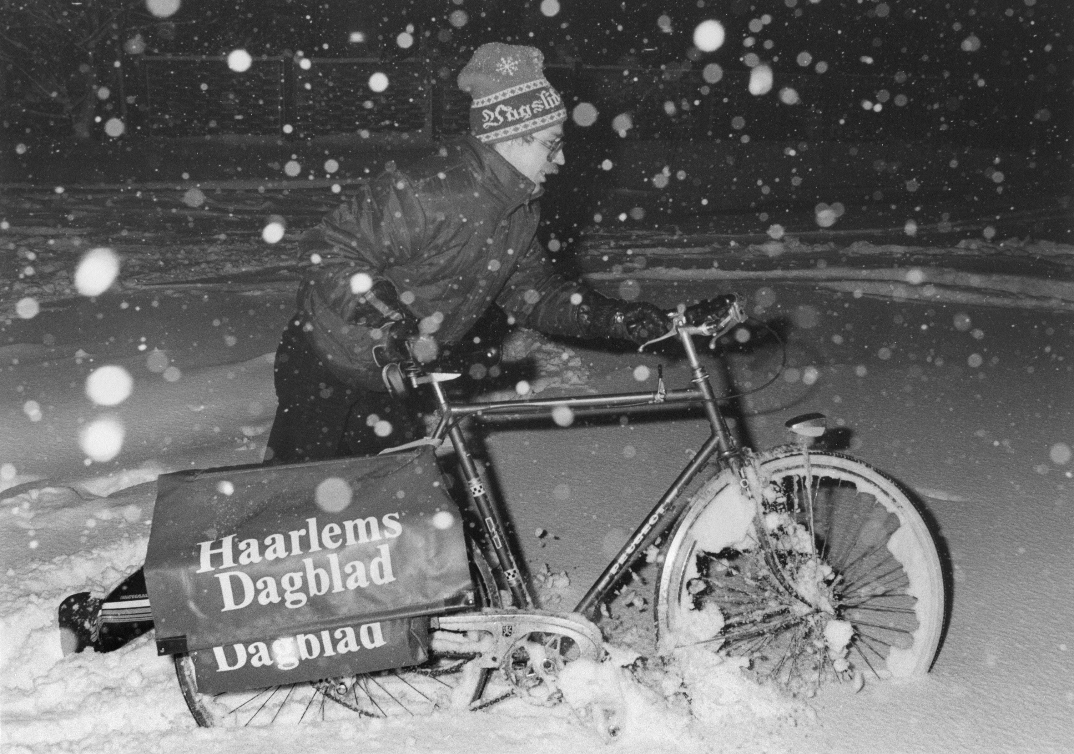 CollectieCollectie Fotoburo de BoerInventarisnummerNL-HlmNHA_5400464934BeschrijvingKrantenbezorger in de sneeuw aan het werk.FotonummerNL-HlmNHA_5400464934DocumenttypeHistorieprenten, tekeningen en foto'sVervaardigerBoer, Cees de (1918-1985) Soort vervaardigerFotograaf AnnotatiesHD.240184LandNederland ProvincieNoord-Holland GemeenteHaarlem PlaatsHaarlem Begindatum23-01-1984Einddatum23-01-1984TechniekFoto Trefwoordenkrantenbezorgers Plaatsinggb42